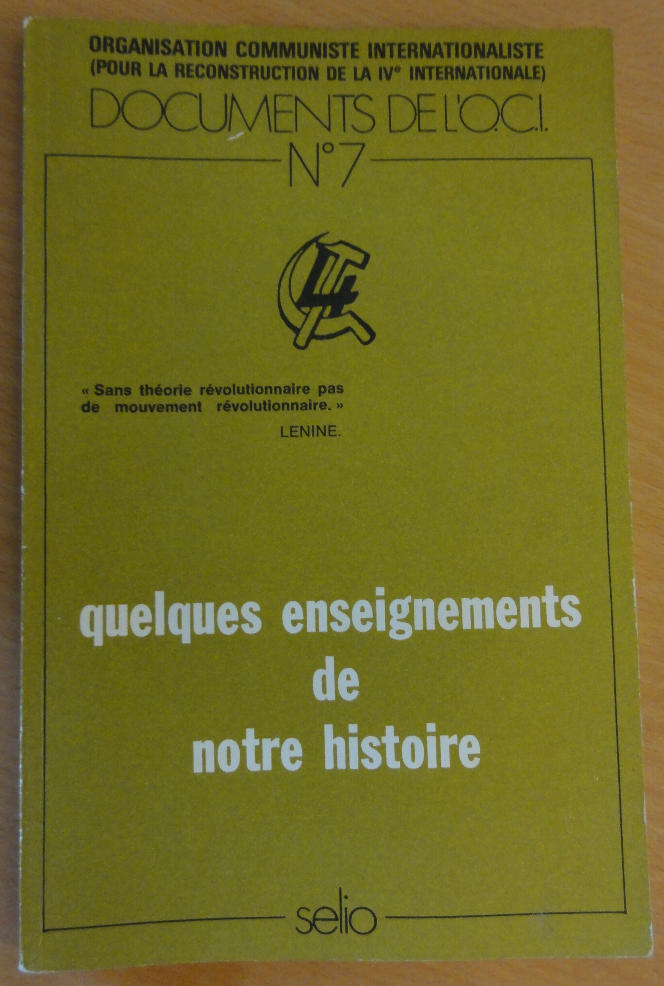 Quelques enseignements de notre histoire - OCI